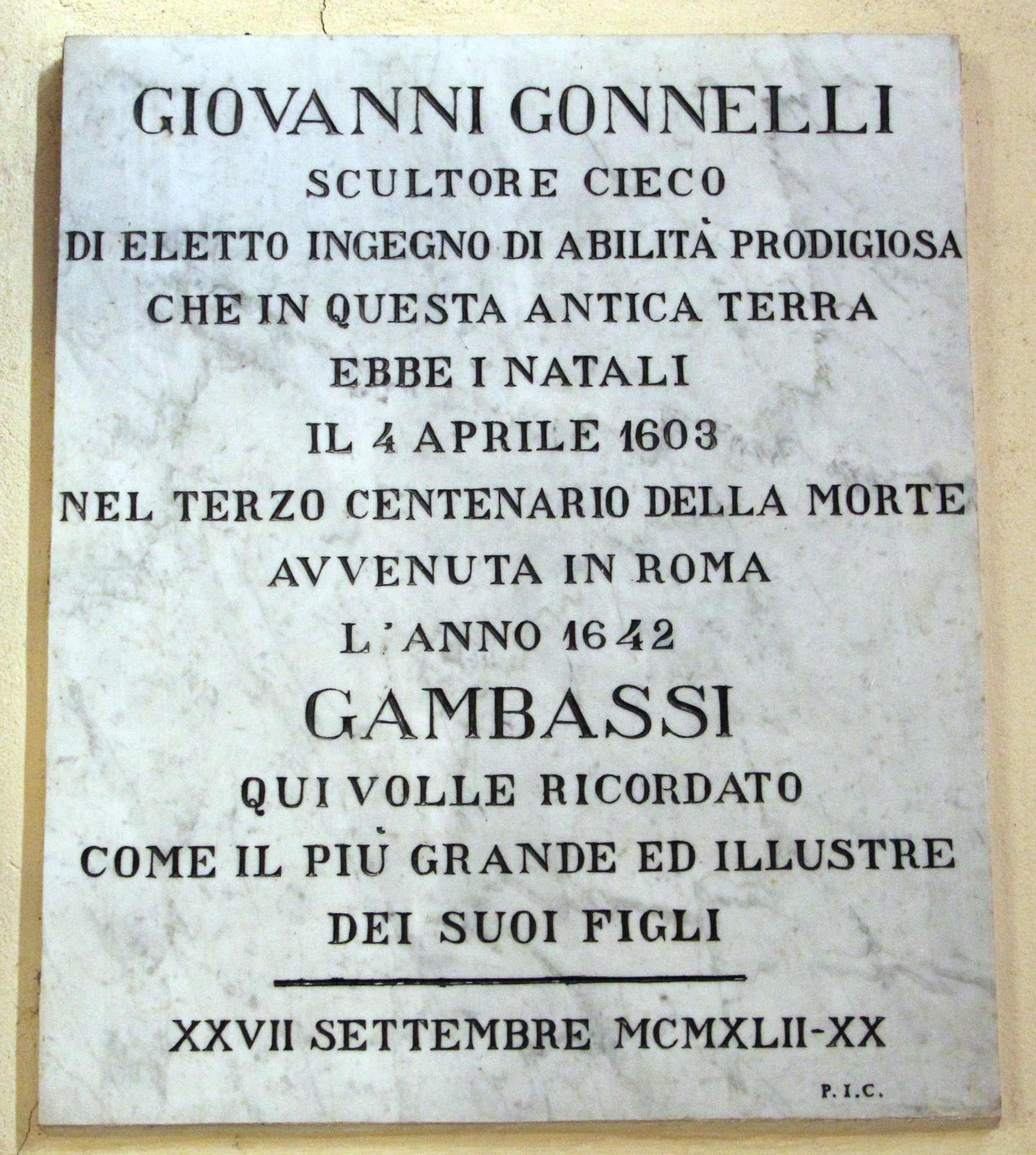 Gambassi Terme